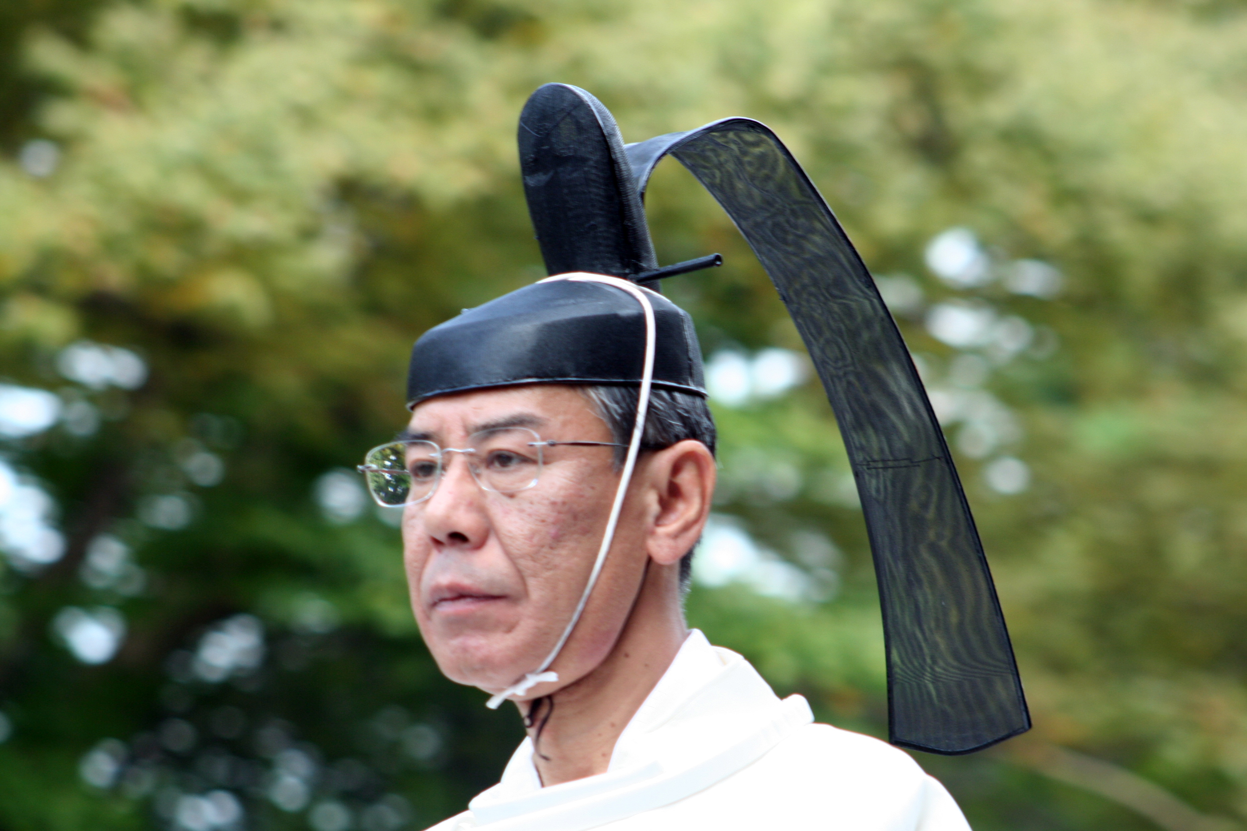 京都府京都市にて開催された時代祭。正午の御所から平安神宮までの行進の様子。2009年10月22日撮影。